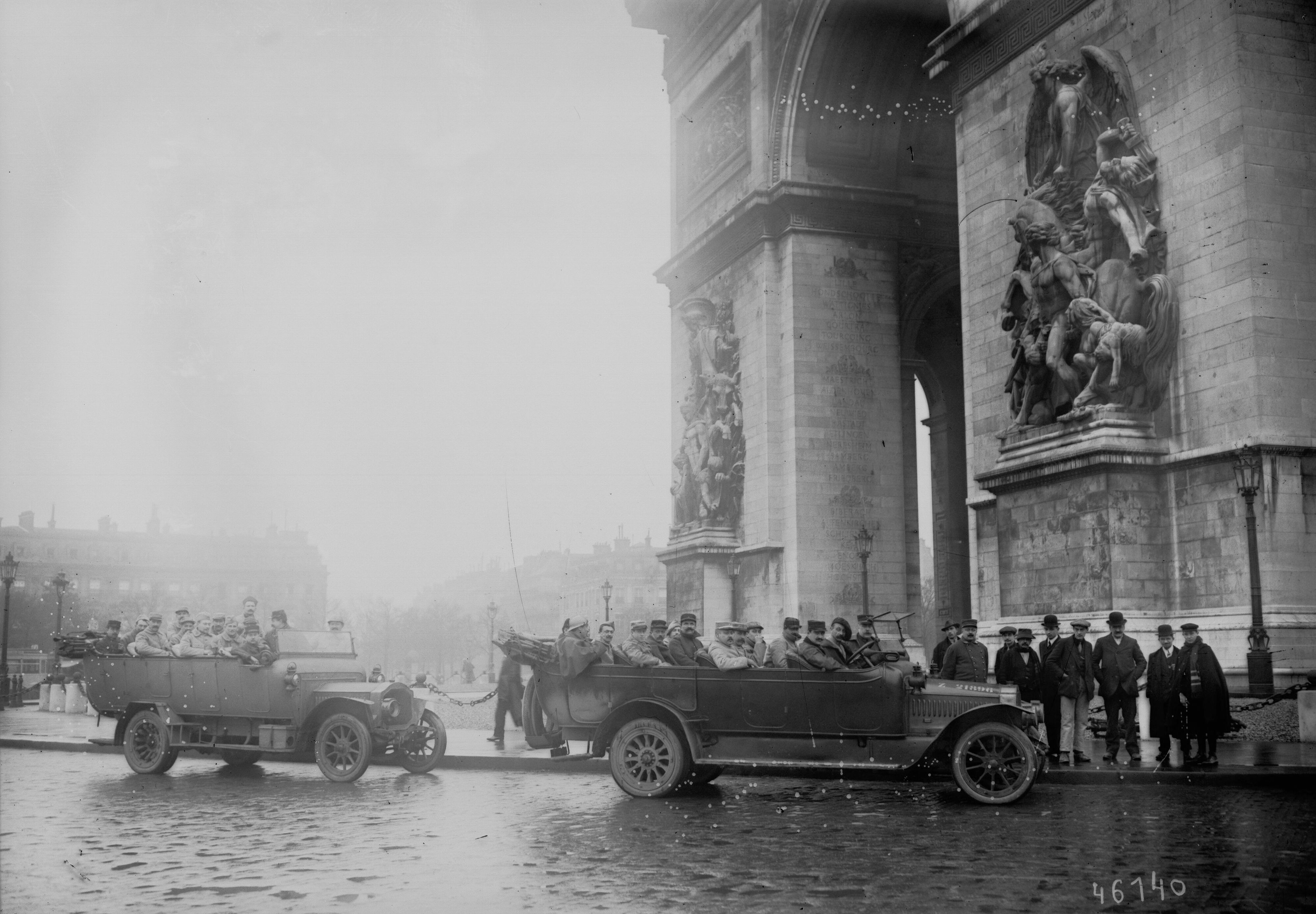 Permissionnaires des régions envahies : [photographie de presse] / [Agence Rol]